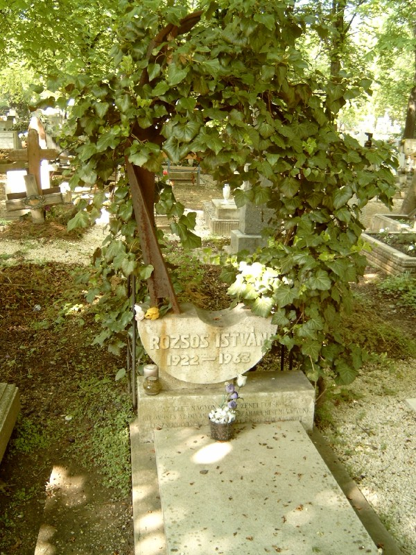 Rozsos István (1922. szeptember 14. - 1963. február 17.) színész sírja Budapesten. Farkasréti temető: 49/5-1-3.